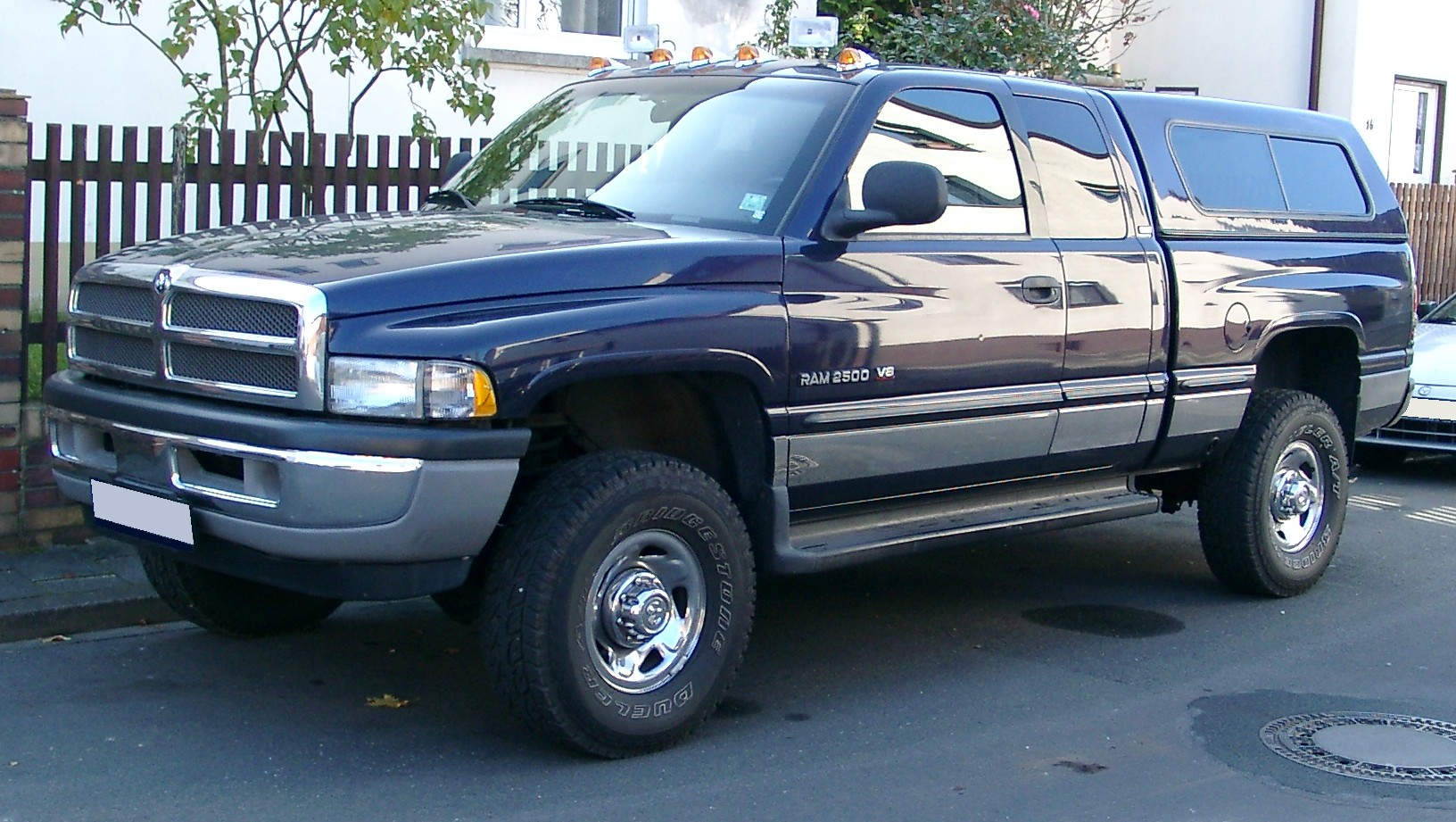 Dodge Ram 2500